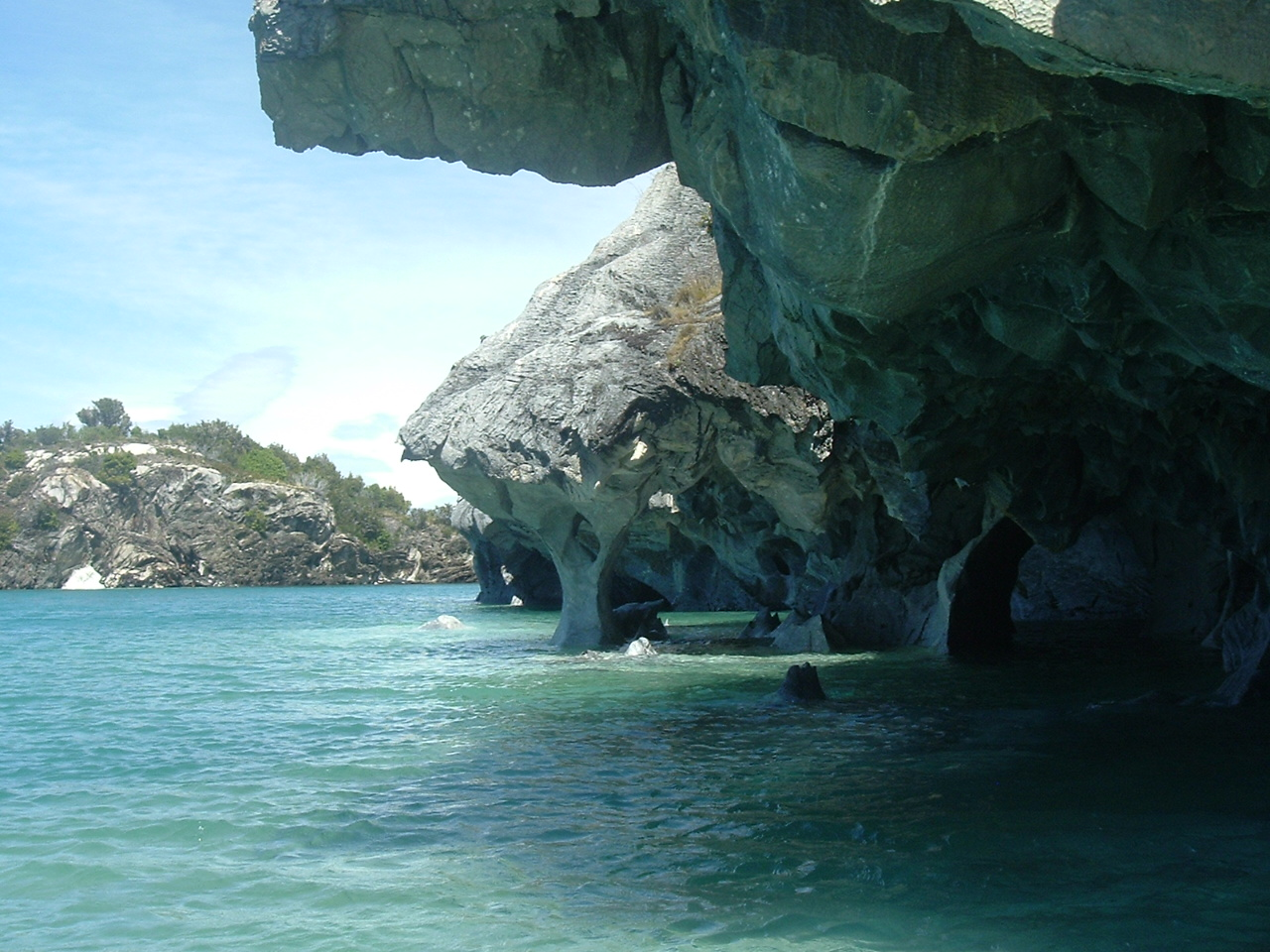 Caverna de Mármol, en el lago General Carrera, región de Aysén, Chile.